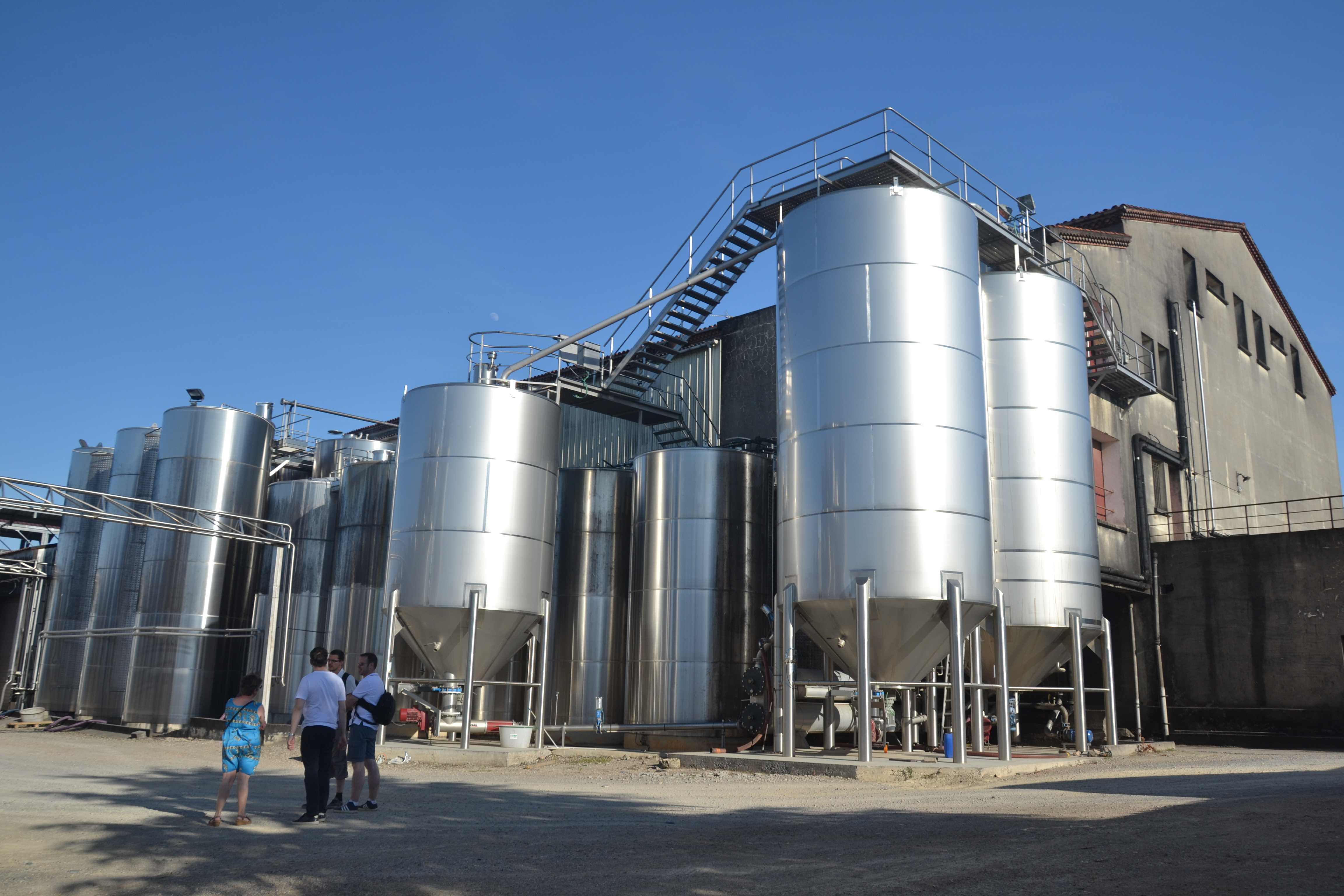 visite de la cave coopérative d'Abeilhan